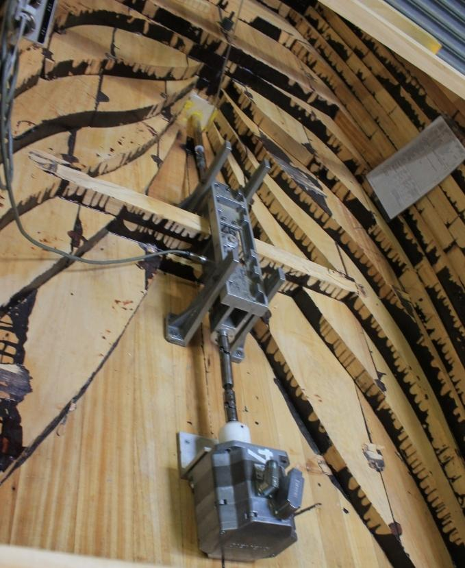 E-Antrieb des Schiffsmodells